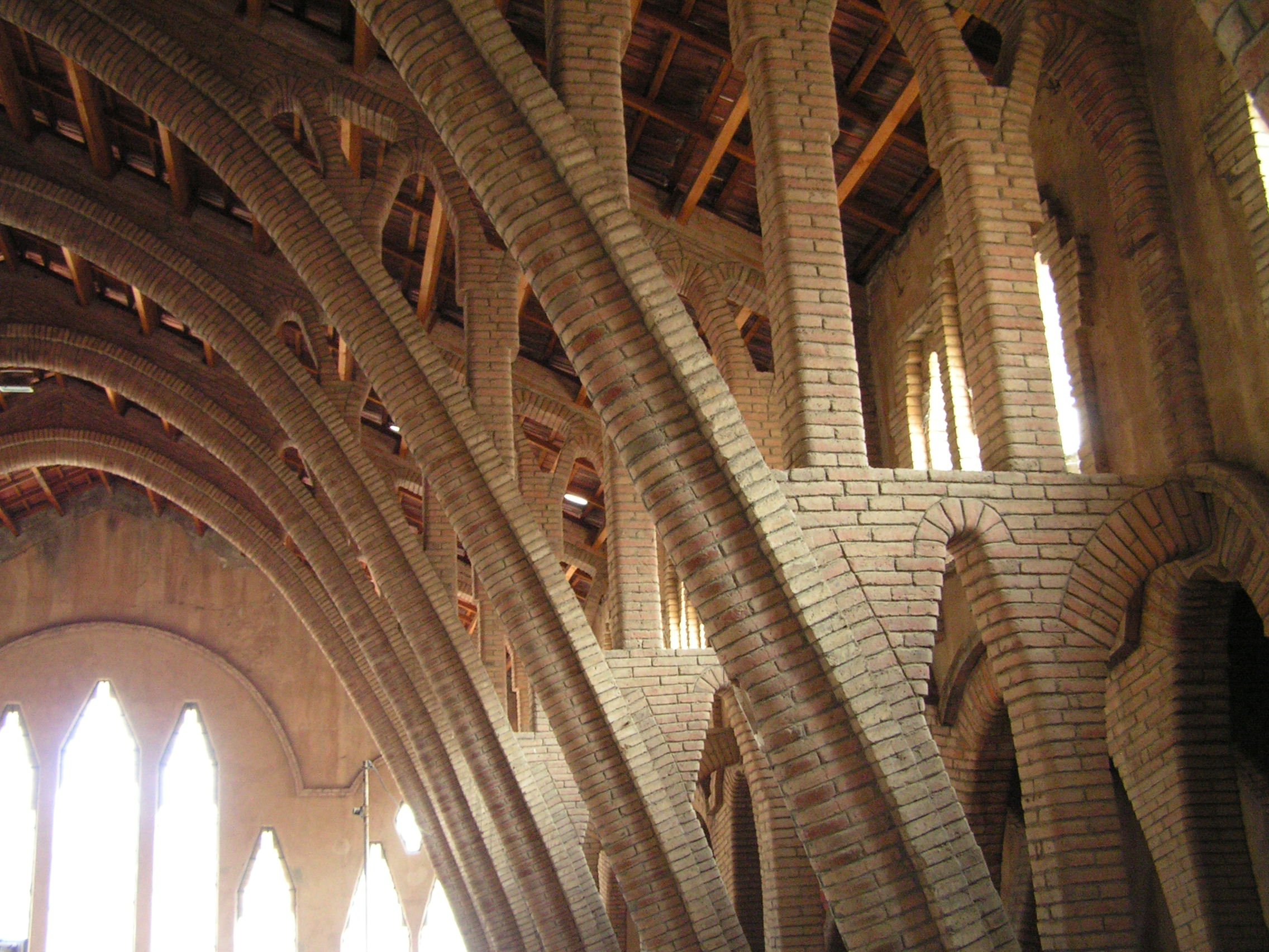 Interior del Celler Cooperatiu de Pinell de Brai, obra de Cèsar Martinell